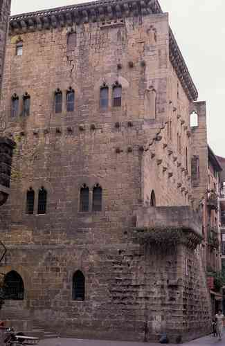 Torre Luzea (Torre Grande). Prósimo se encuentra Torre Motxa (Torre Corta).